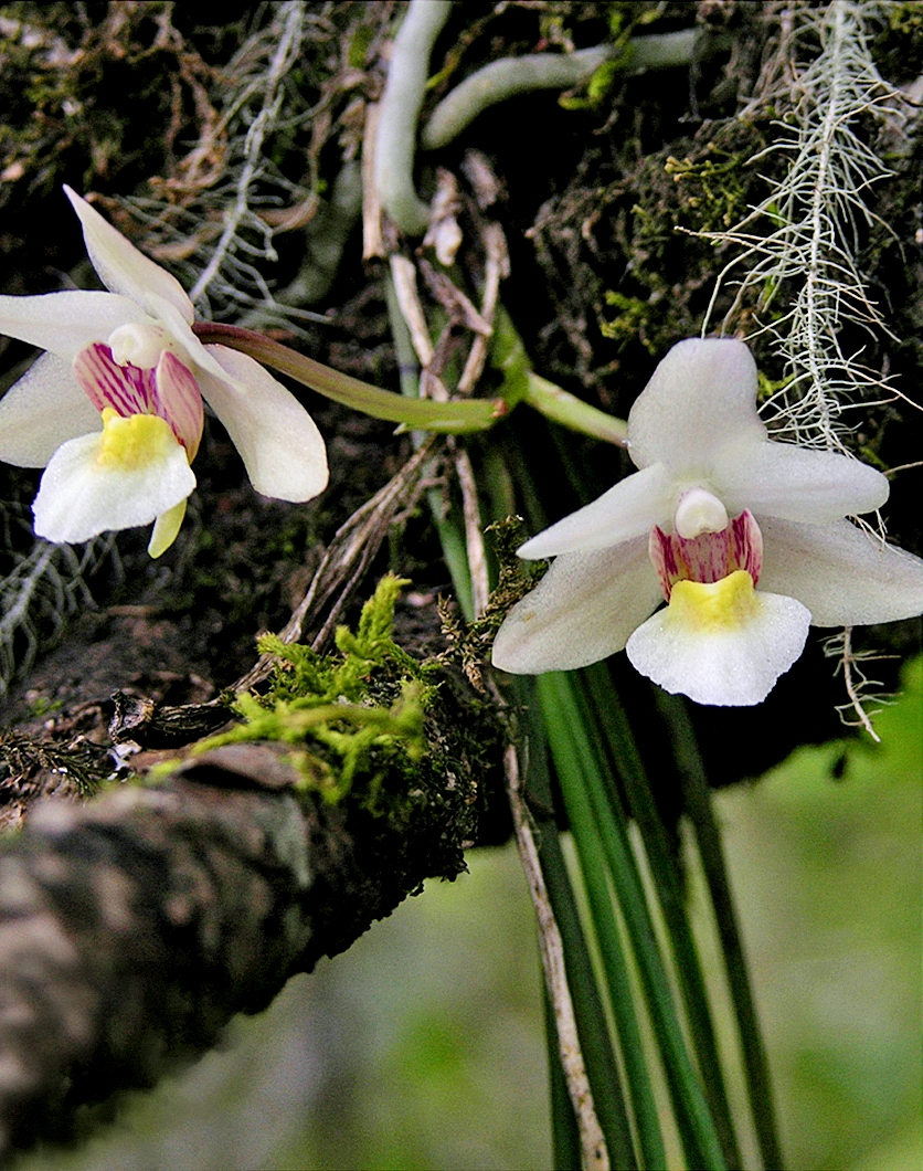 Blüten von Holcoglossum nujiangense